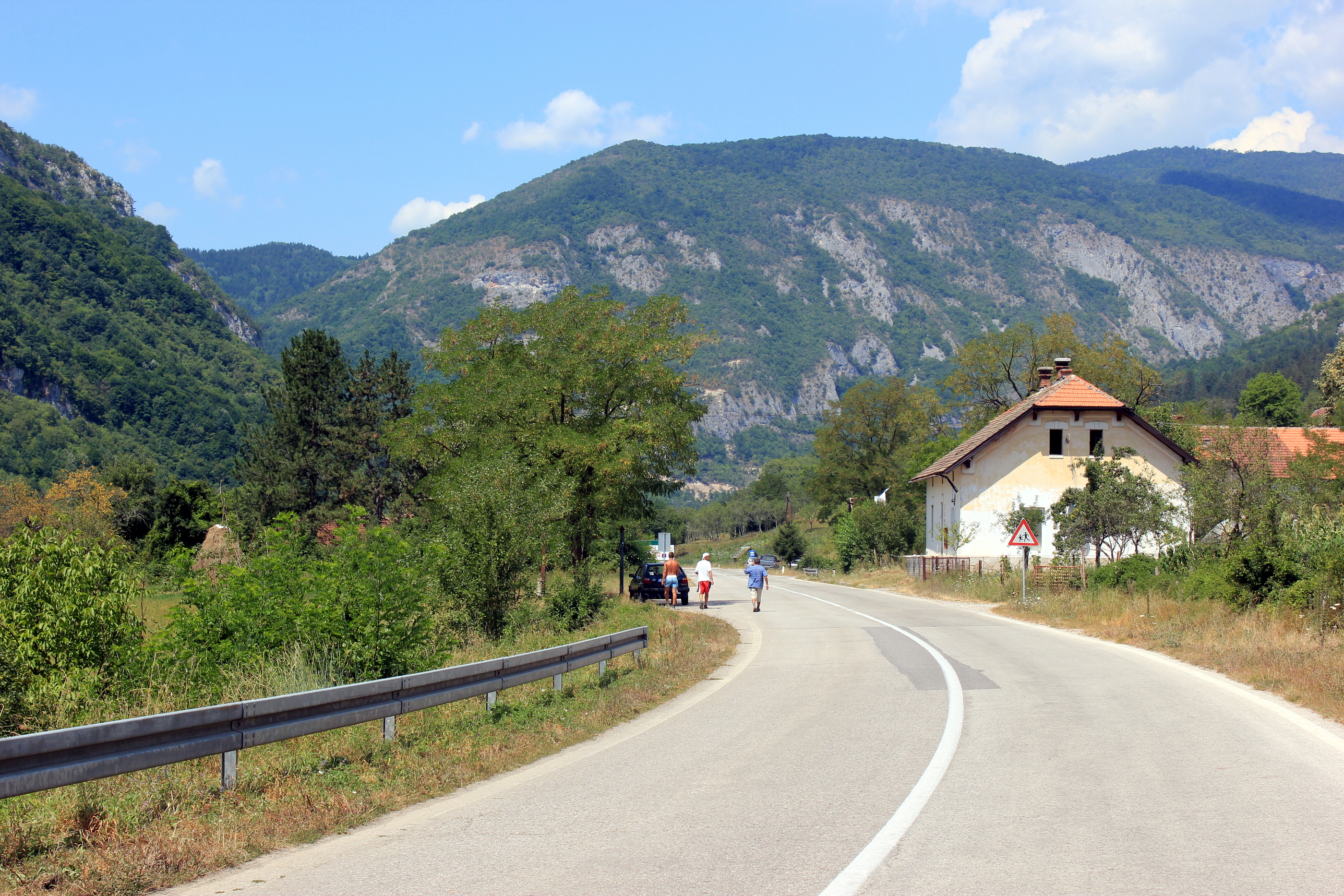 Der ehemalige Bahnhof von Mrsovo, Gemeinde Rudo an einem Abzweig der Bosnischen Ostbahn (heute Regionalstraße R-467)